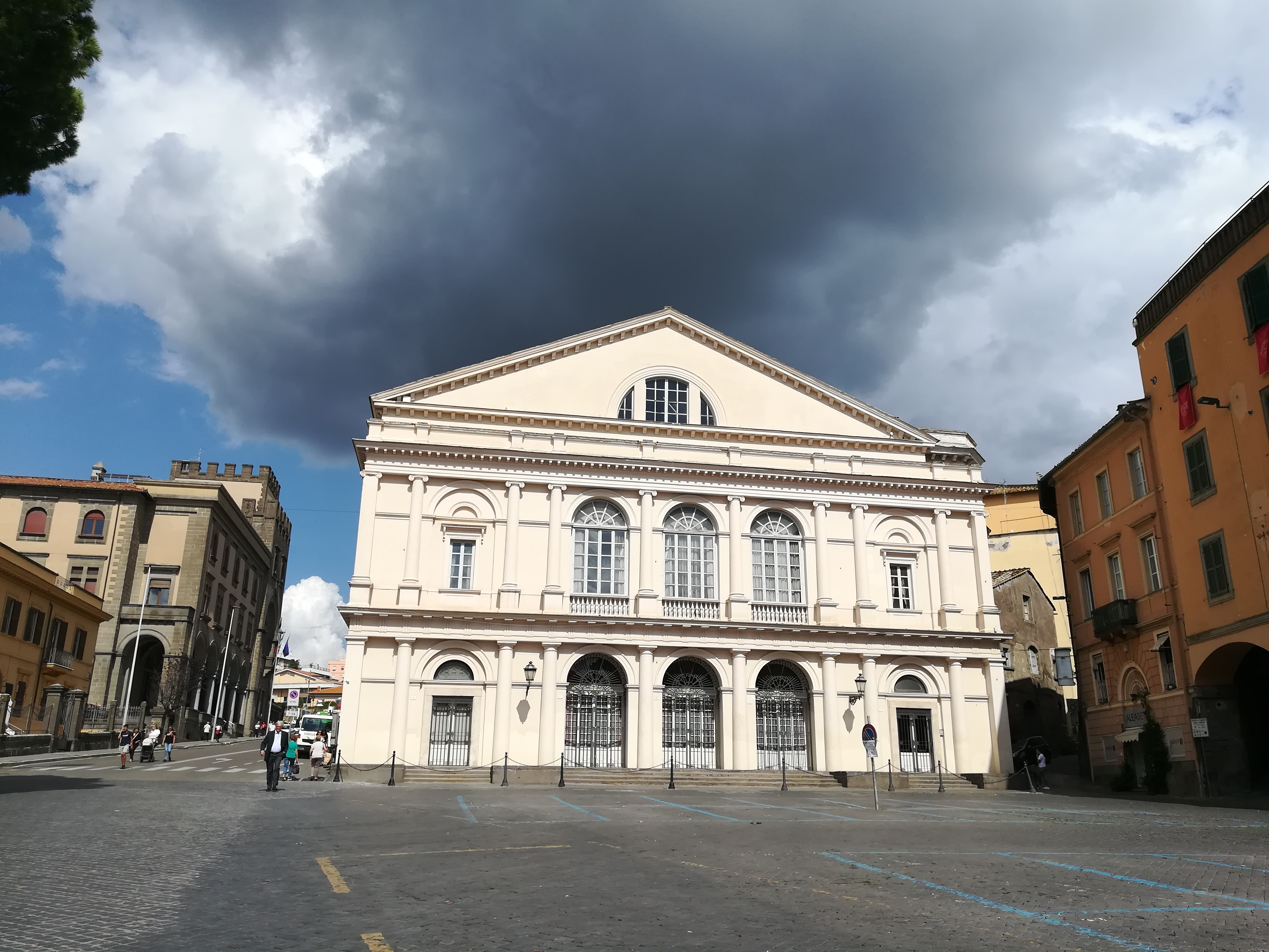 Facciata del teatro, su piazza Giuseppe Verdi